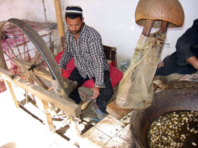 Odvijeni hedvabi z kokonu